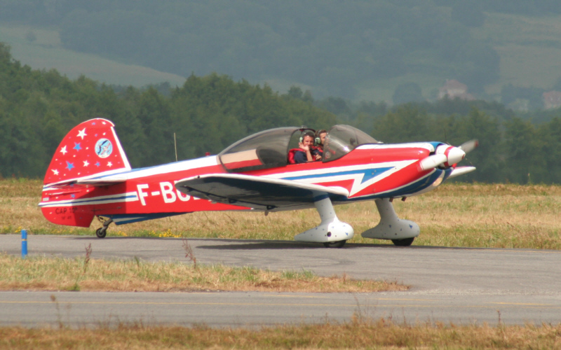 Mudry Cap 10B n°41 F-BUDJ